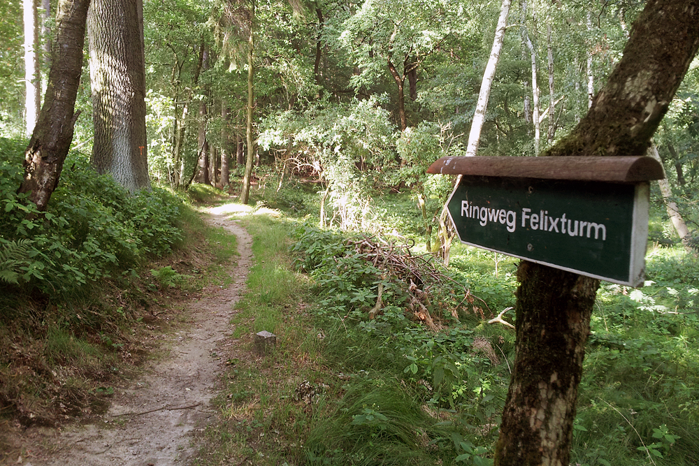 Wegweiser zum Ringweg (sogenannter Kohlsdorfweg) im Hüttertal am Schafberg, Weg zum Felixturm